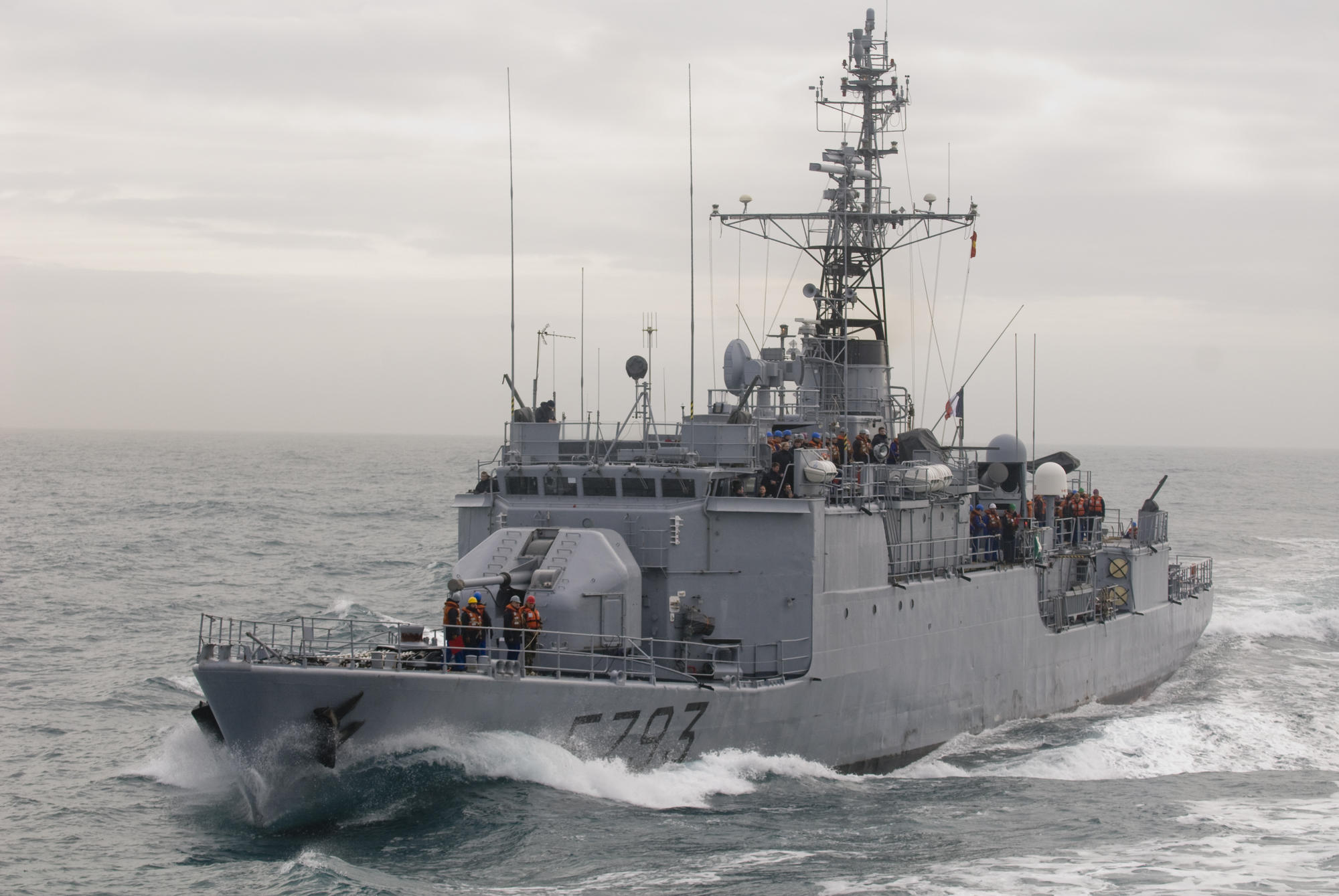 L'Aviso CDT Blaison en patrouille au large des côtes Atlantique M.DENNIEL-Marine nationale